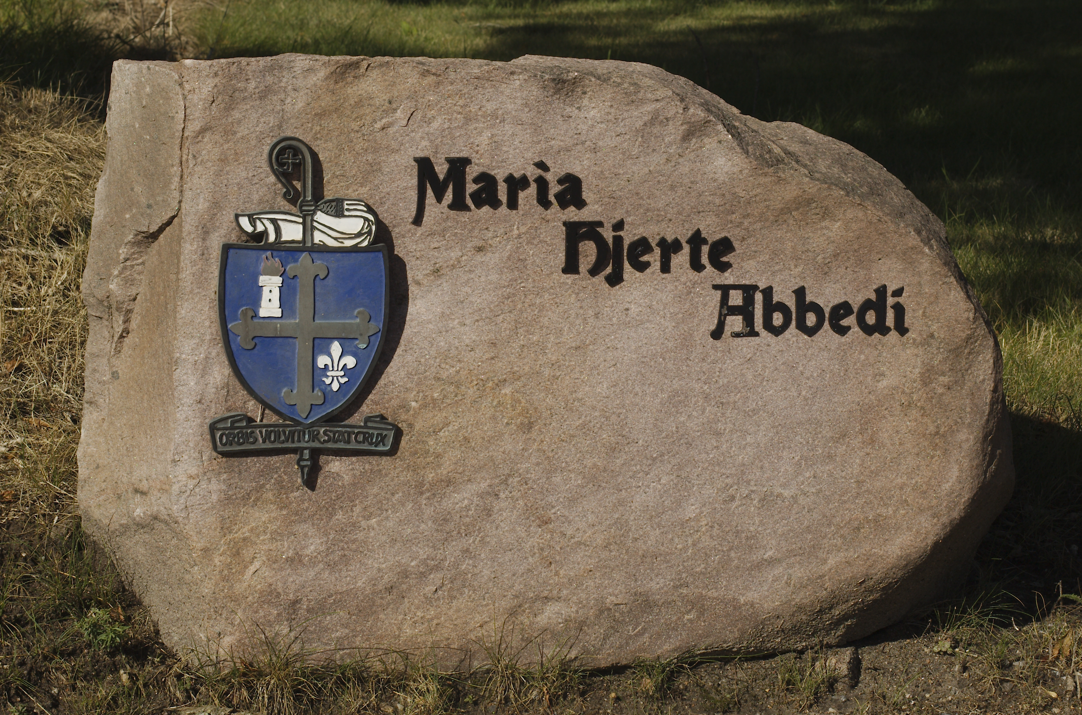 Sten ved Maria Hjerte Abbedi